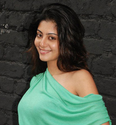 Neha Uberoi (Oberoi) at Dus Kahaniyaan Promotional Event